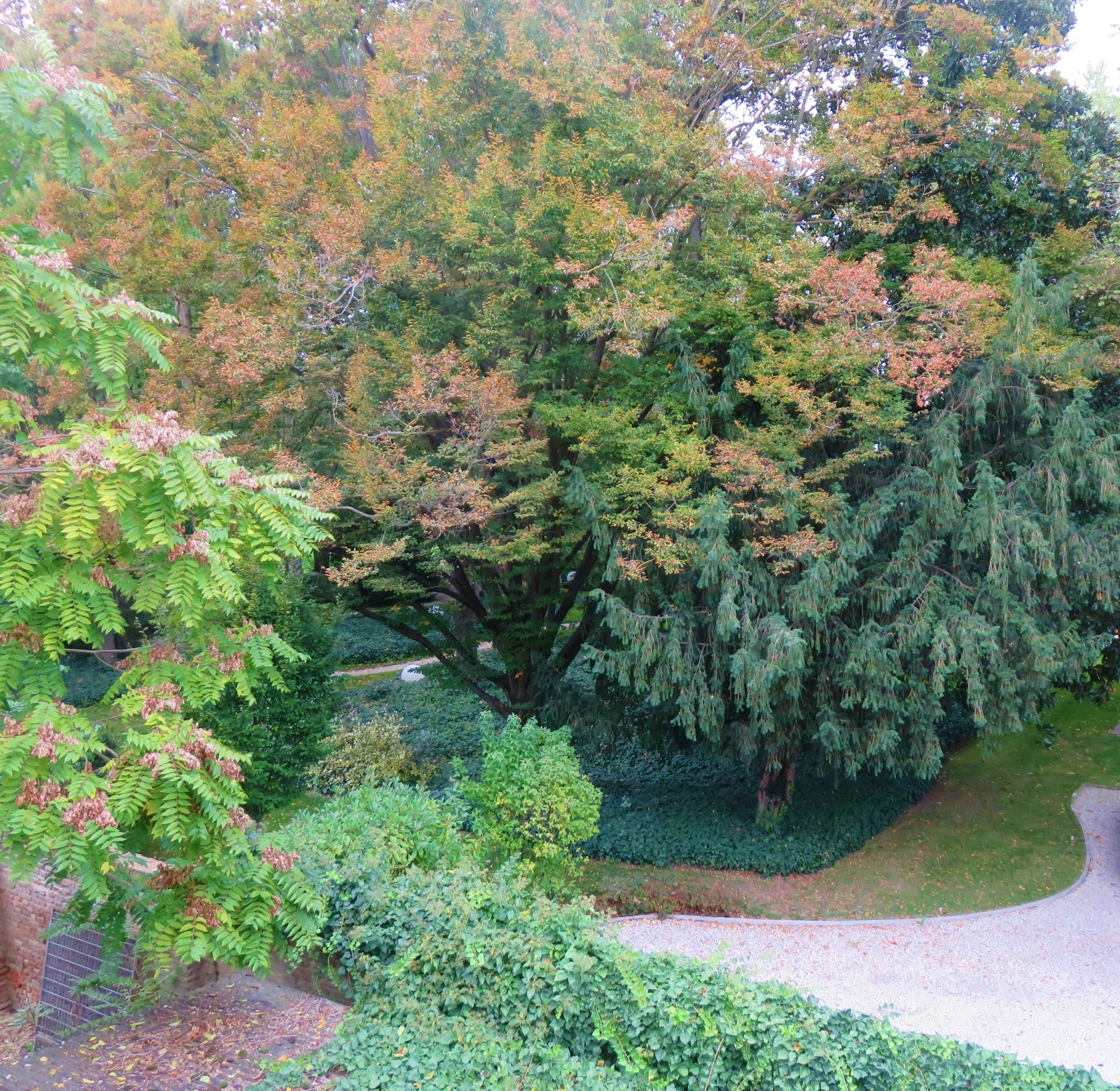 Giardino.